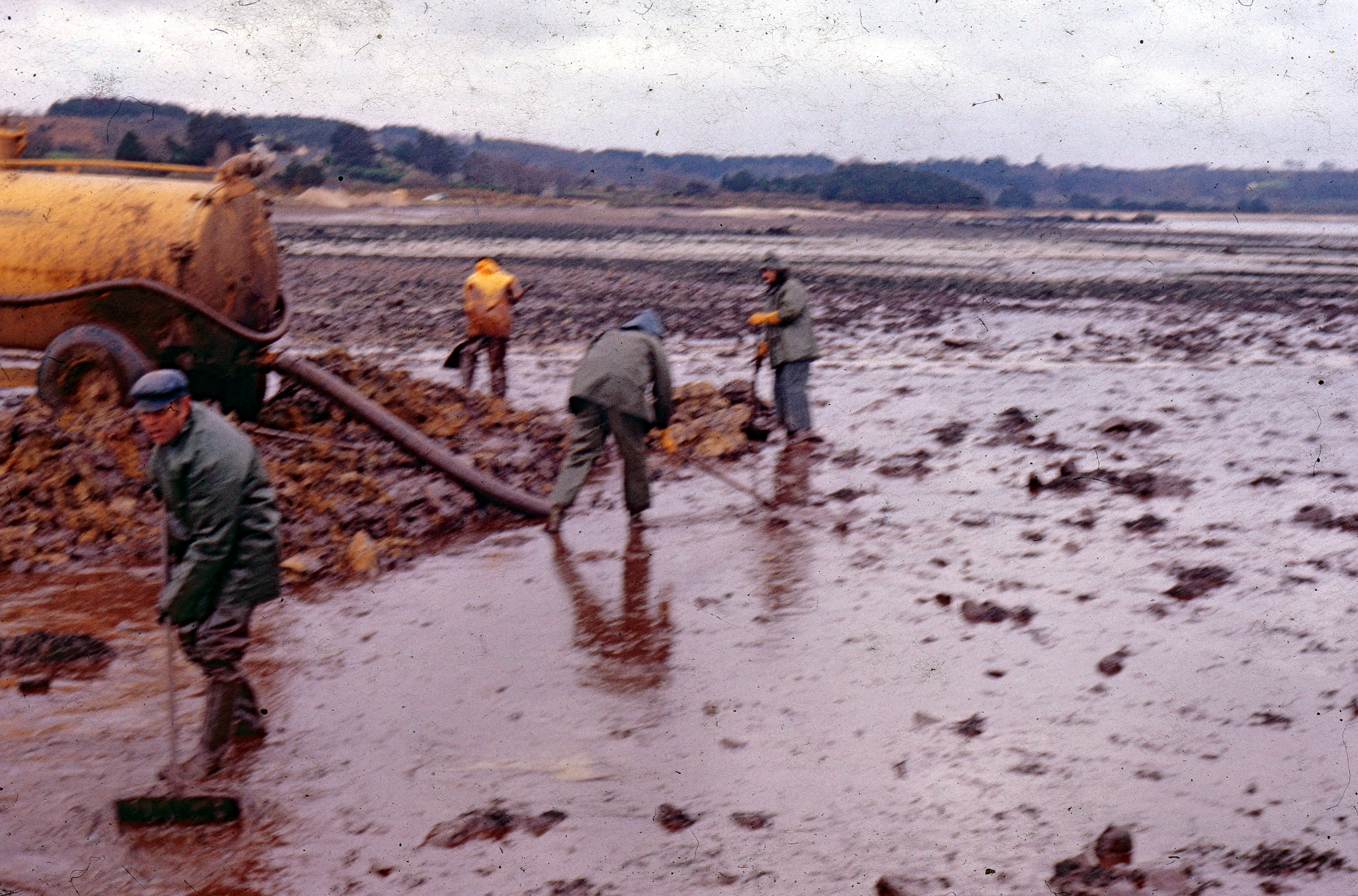 Nettoyage d'une plage des Côtes-d'Armor à la suite du naufrage de l'Amoco Cadiz.